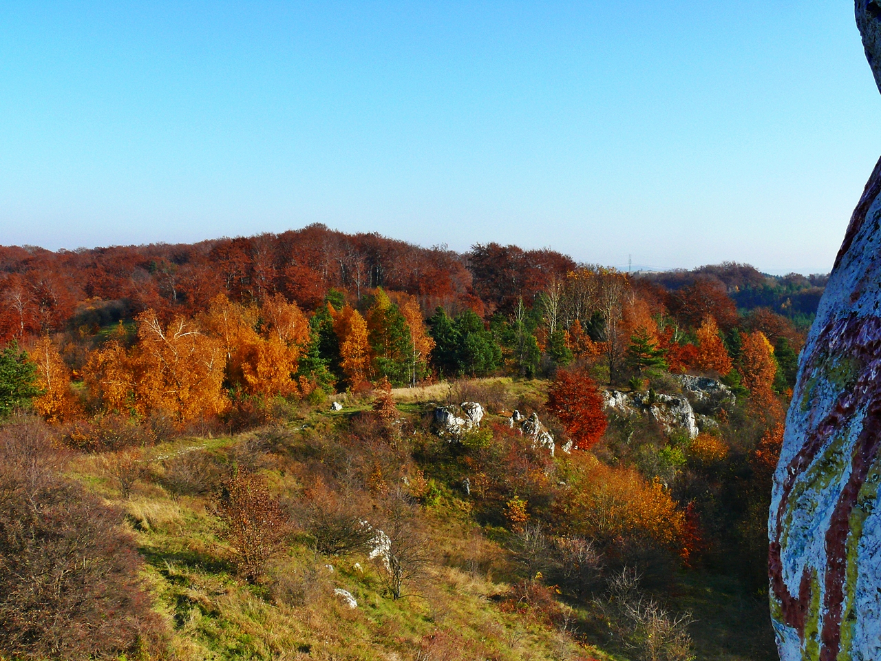 Niegowonice - Jura Krakowsko Częstochowska